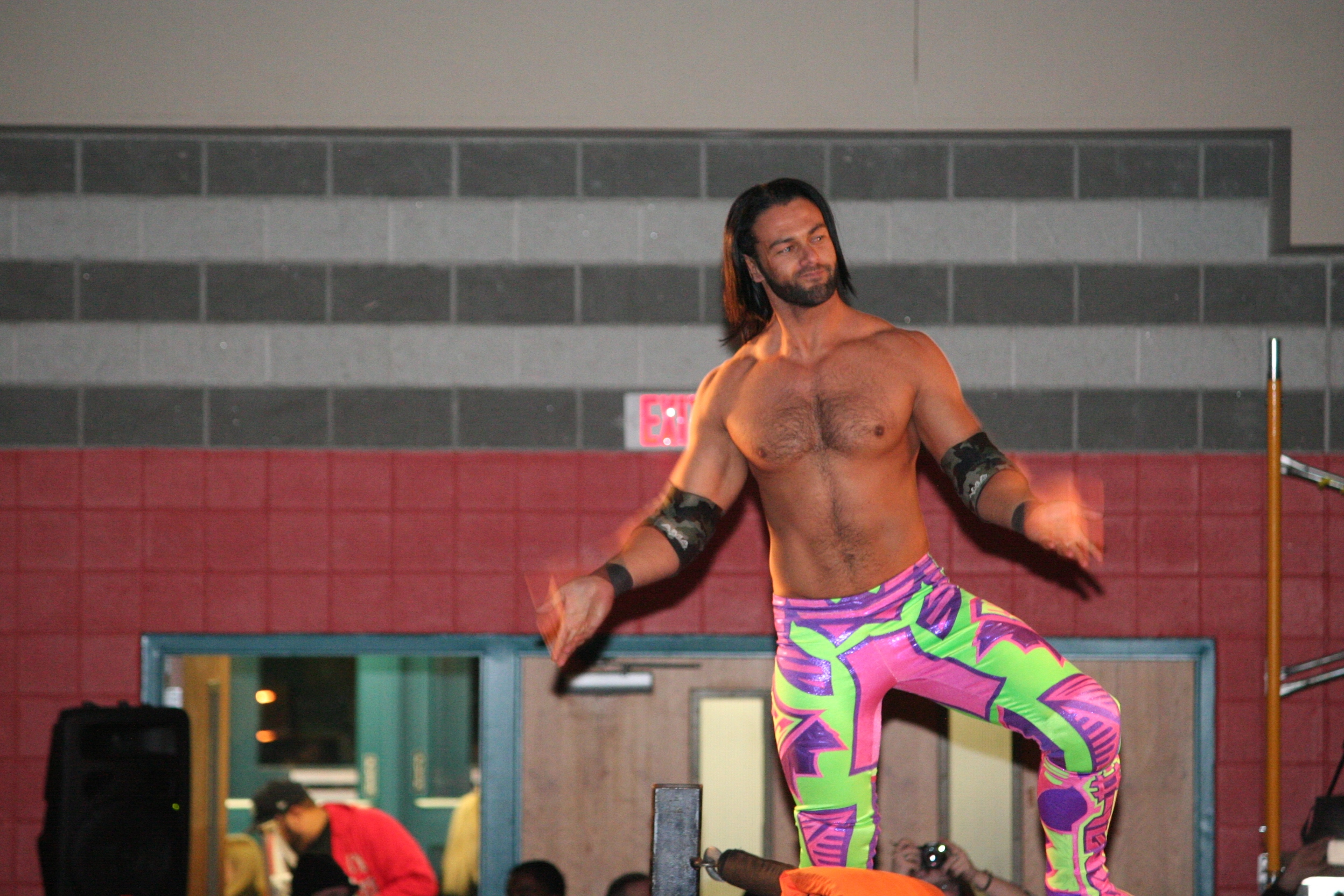 Le catcheur PJ Black (Justin Gabriel à la WWE) en janvier 2015.